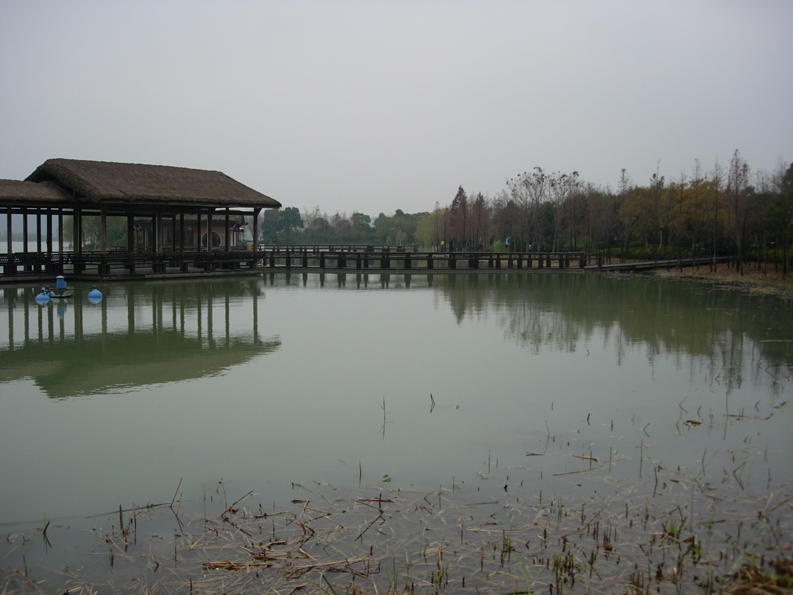 渤公島から蠡湖側の眺め